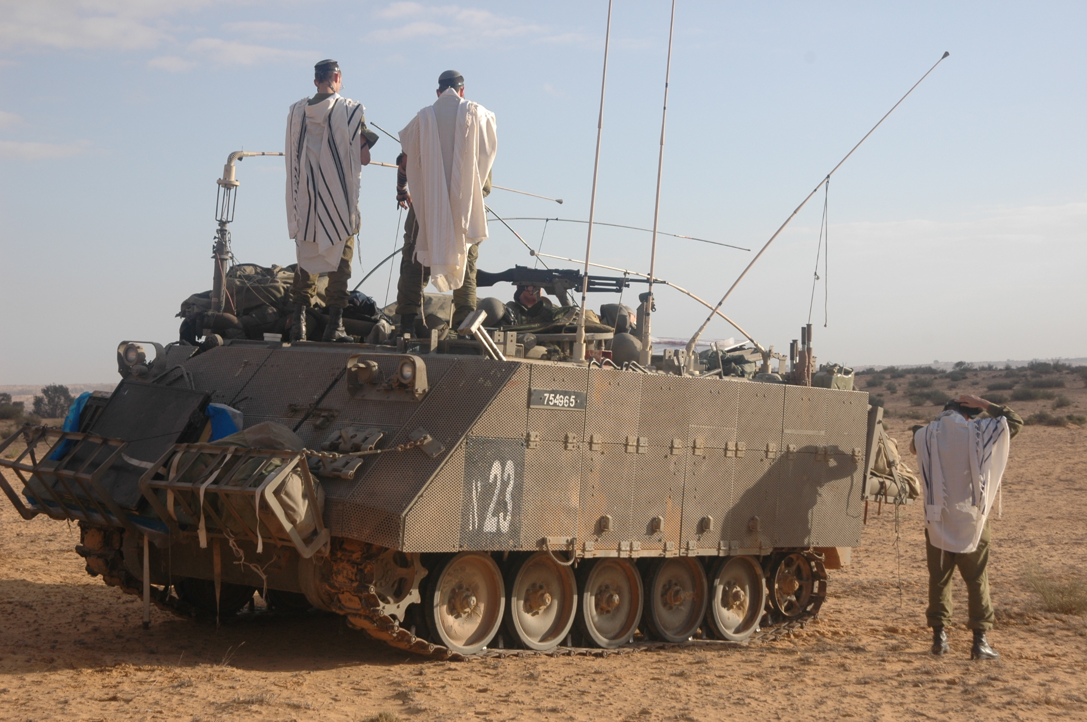 חיילים מחטיבה 130 מתפללים